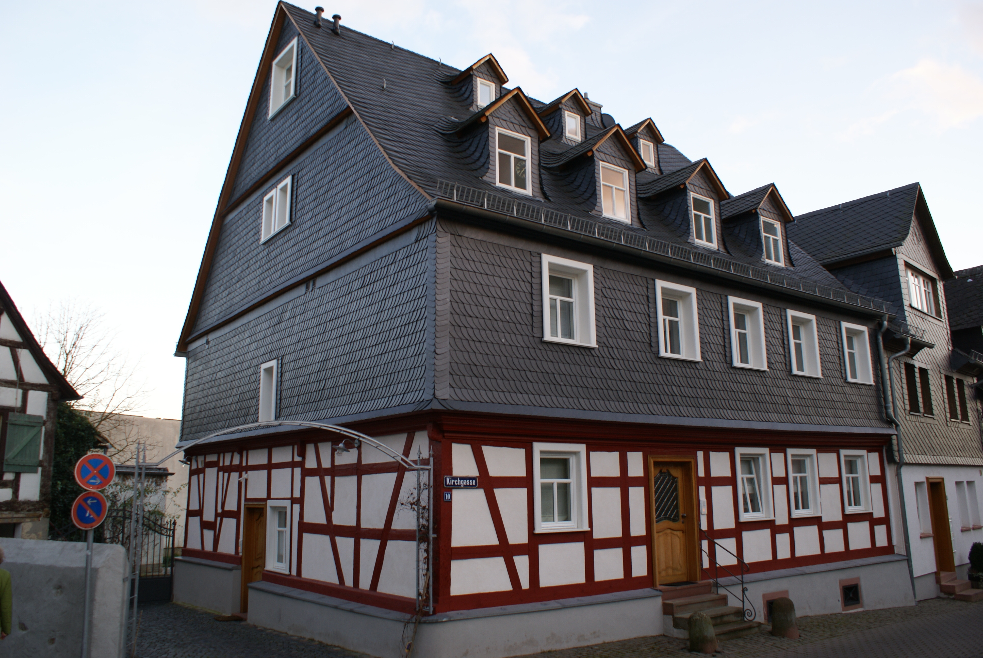 Dorfansicht Rauenthal